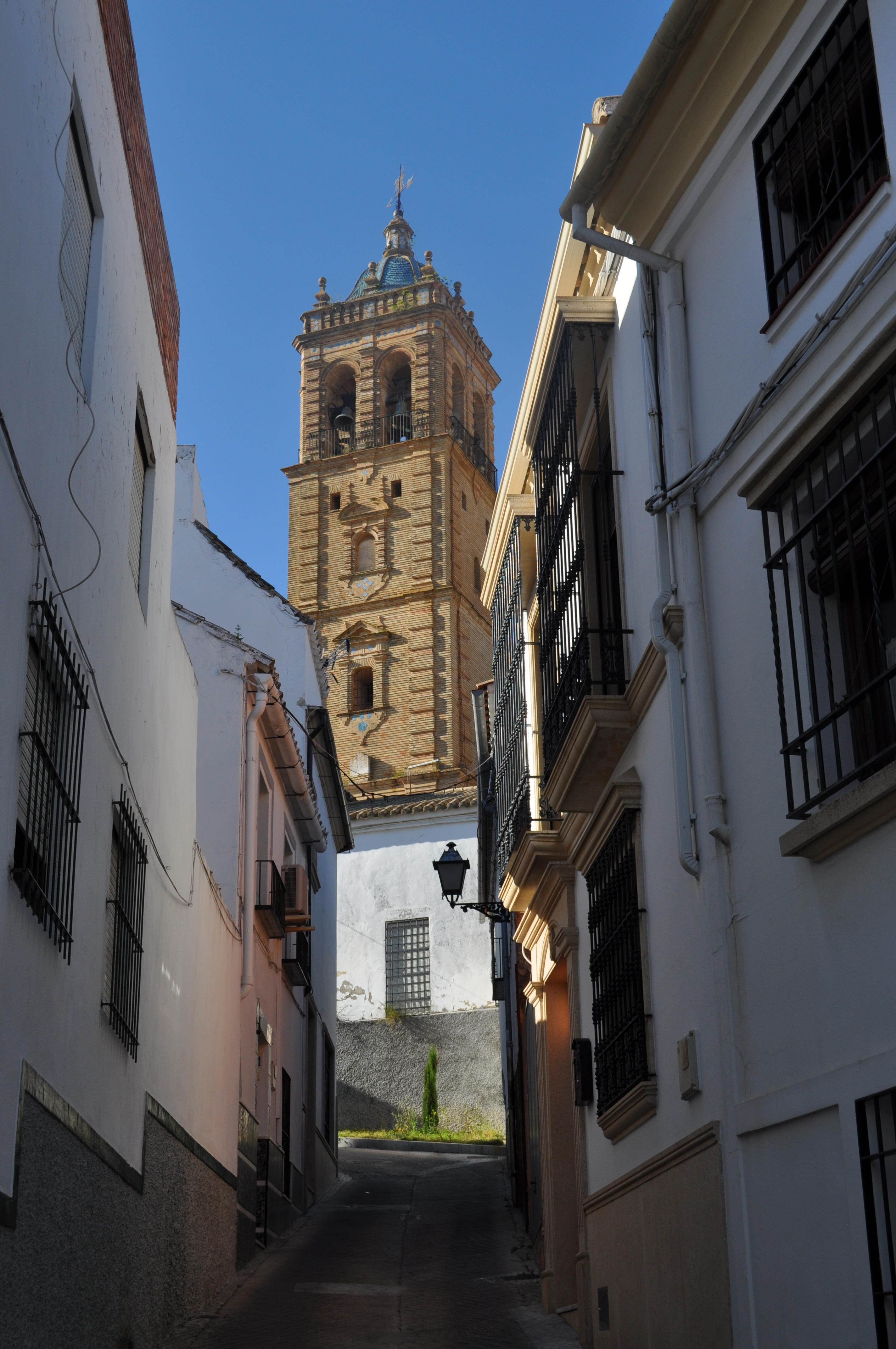 La torre de la Parroquia fue levantada en sustitución de una anterior de Hernán Ruiz III, destruida en el terremoto de Lisboa de 1755. Dicha torre se erigió entre 1779 y 1789 con proyecto del maestro local José Vela.